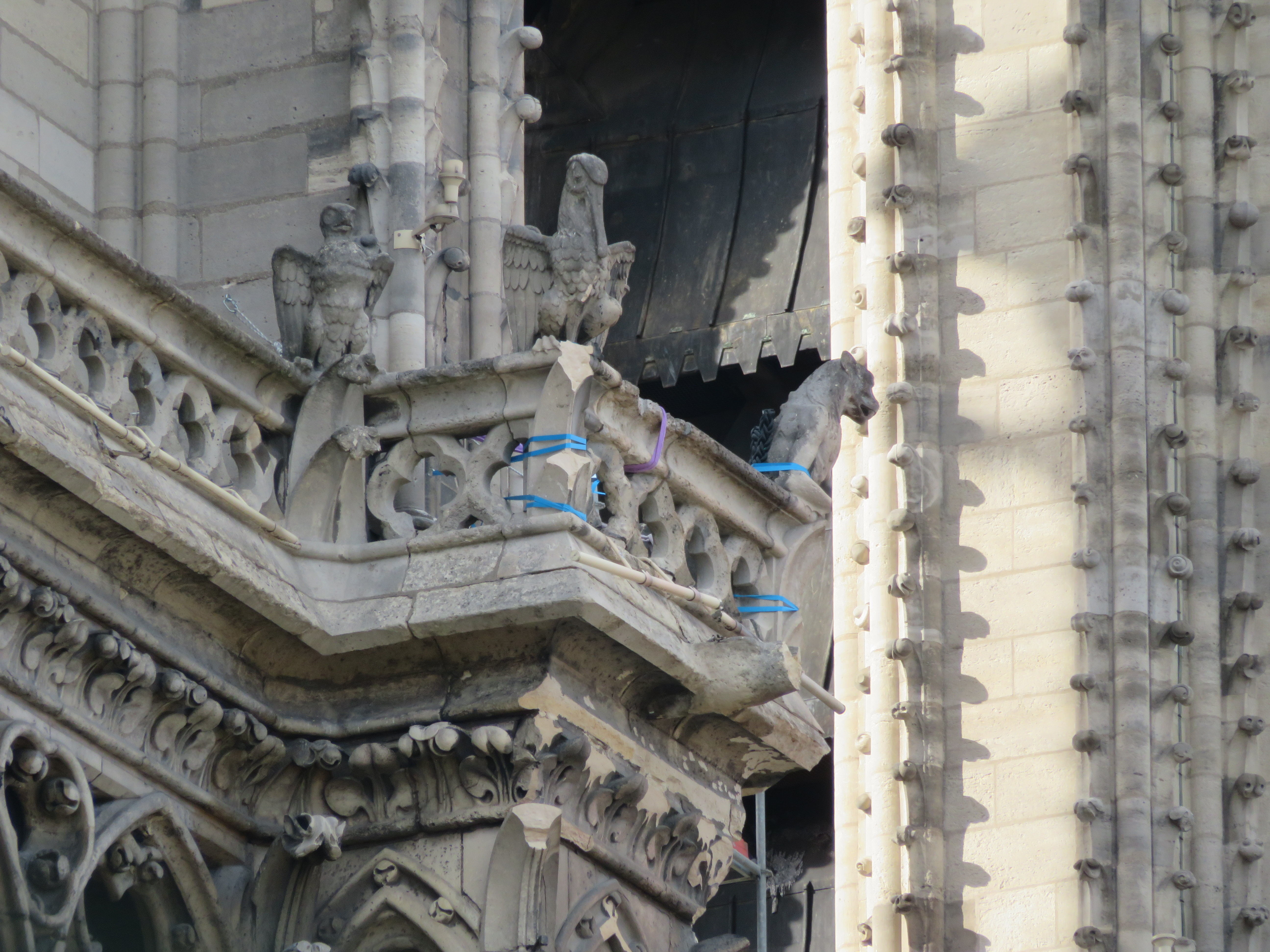 Photos du dimanche 21 avril (fin d’après-midi), pour suivre les travaux sur Notre-Dame après l’incendie (consolidation de diverses parties).